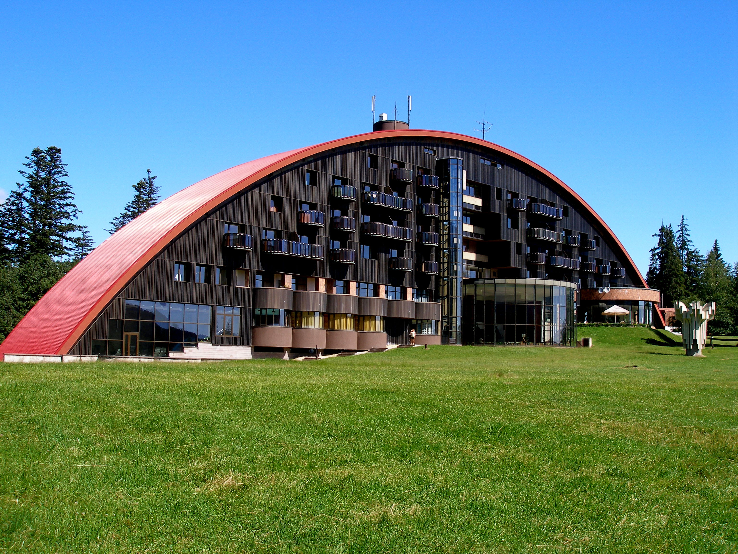 Podtatranská obec Tatranská Javorina.